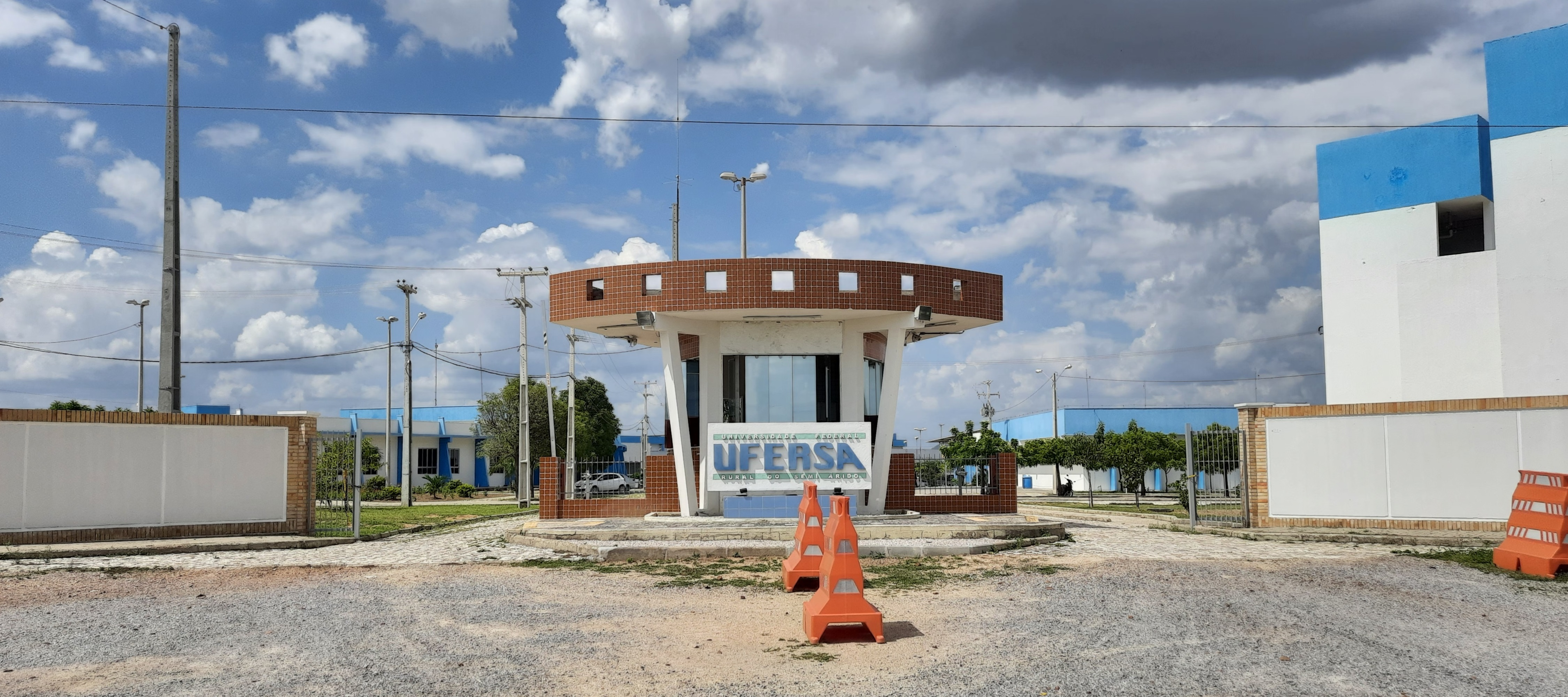 Câmpus da Universidade Federal Rural do Semi-Árido (UFERSA) - Pau dos Ferros, Rio Grande do Norte, Brasil.